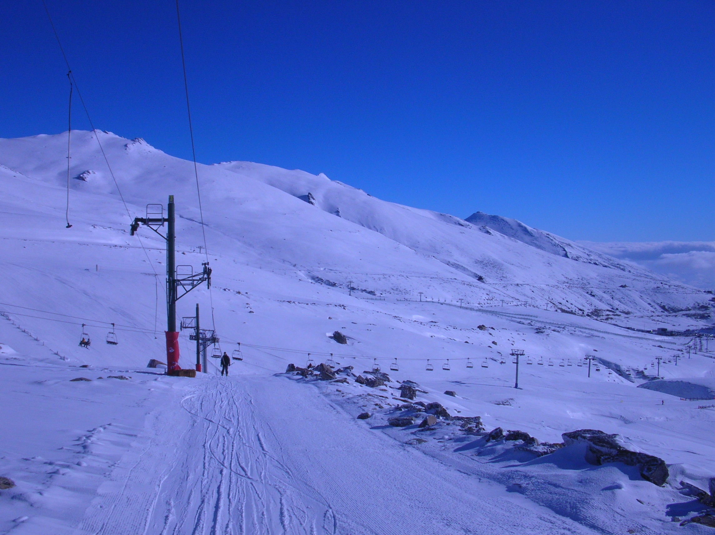 Remonte de la pista de Los Asnos, en la estación de sky de Alto Campoo (Cantabria, España). La foto está sacada mientras subo y mirando hacia la zona del Cornón.